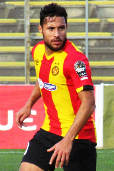 Youcef Belaïli sous les couleurs de l'Espérance sportive de Tunis lors d'une rencontre gagnée en Ligue des champions de la CAF contre Platinum FC du Zimbabwe (2-0) au stade olympique d'El Menzah, le 18 janvier 2019.